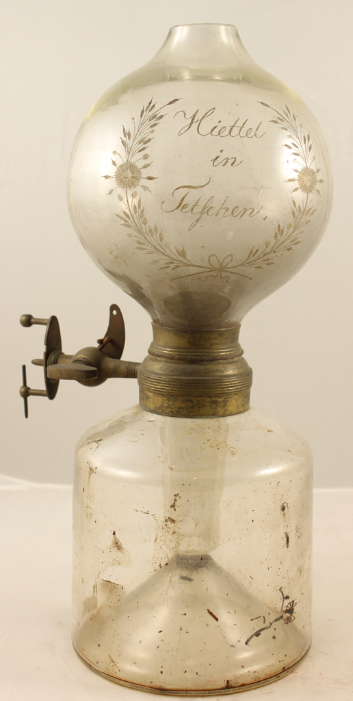 Unterteil: zylindrisches Glasgefäß mit nach inne gewölbtem Boden. Durch ein Metallstück an dem sich der Zündmechanismus befindet mit dem oberen Teil verbunden. Oberteil: kugelförmiges Glasgefäß, an der Oberseite offen, nach unten in ein Glasrohr mündend, welches in den Unterteil hinein reicht. Auf dem Oberteil die Gravur: "Hiettel / in / Tetschen." Die Schrift ist von einem Floralmuster umfasst, welches in Form von zwei, unter der Schrift mit einer Schleife gebundenen Planzenranken erscheint. Döbereinsches Feuerzeug = Die Reaktion von verdünnter Schwefelsäuere mit Zink erzeugt Wasserstoff, der, katalysiert über "Platinschwamm" , als Knallgasreaktion mit Sauerstoff zu Wasser verbrennt. Eine sinnvolle Konstruktion erlaubt die kontrollierte Verwendung dieser Reaktion: Das Zink ist räumlich von der Schwefelsäure getrennt, so dass nur bei Bedarf Wasserstoff erzeugt wird, geregelt durch ein Ventil vor dem Platinschwamm und damit vor der Knallgasreaktion. So wird die Funktion als Feuerzeug ermöglicht. Sie wird nach 1880 überflüssig durch Zündholz und Feuerzeug, da hierbei die aufwändige Befüllung mit Schwefelsäure entfällt. "Es eine höchst angenehme Empfindung sei, wenn wir eine bedeutende Naturkraft technisch also bald zu irgend einem nützlichen Gebrauch eingeleitet sehen: und so bin ich in dem Falle, mich Ew. Wohlgeboren immer dankbar zu erinnern, da Ihr so glücklich erfundenes Feuerzeug mir täglich zur Hand steht." Goethe 1826.